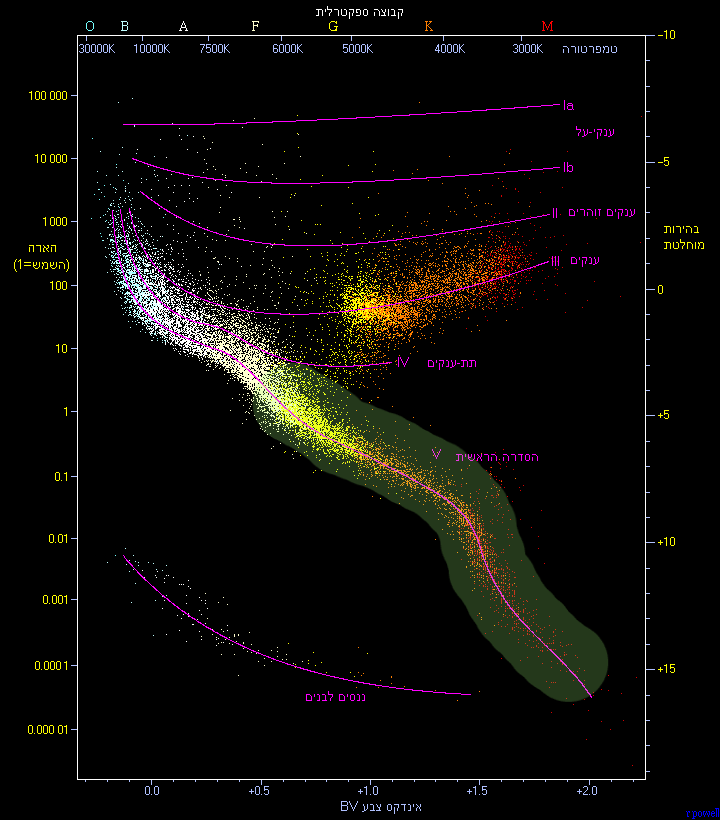 דיאגרמת הרצשפרונג-ראסל בה מסומן בירוק תחום בו יכולים להימצא כוכבים דמויי שמש.